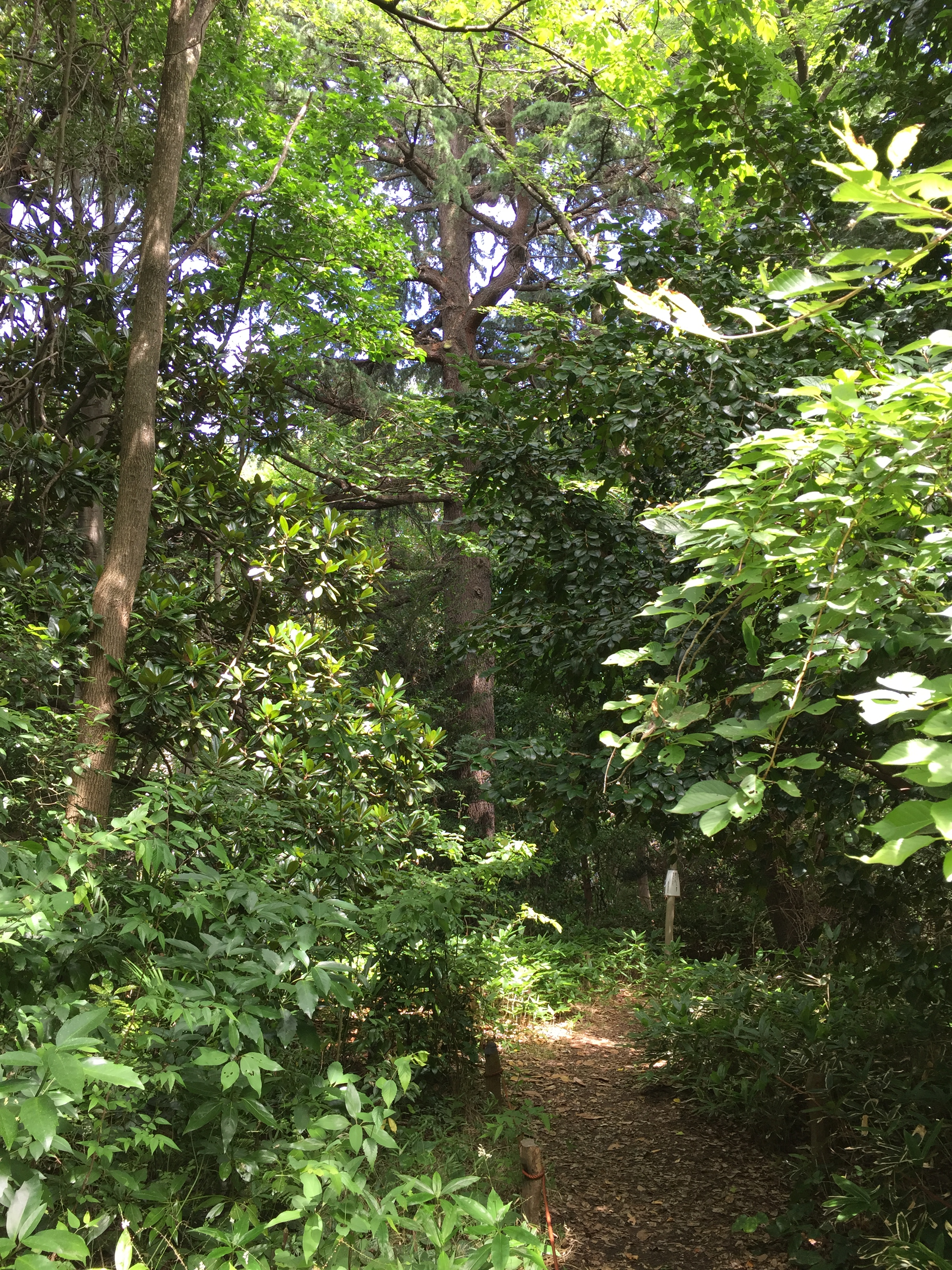 狛江弁財天池特別緑地保全地区内。中央に見えるのははヒマラヤスギ。